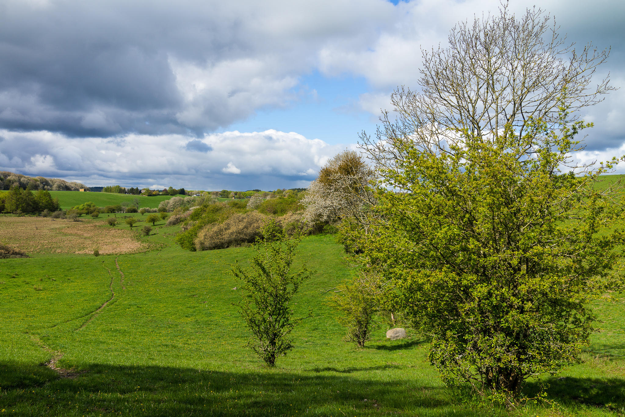 Grüne Landschaft: Svartskylle im Frühling